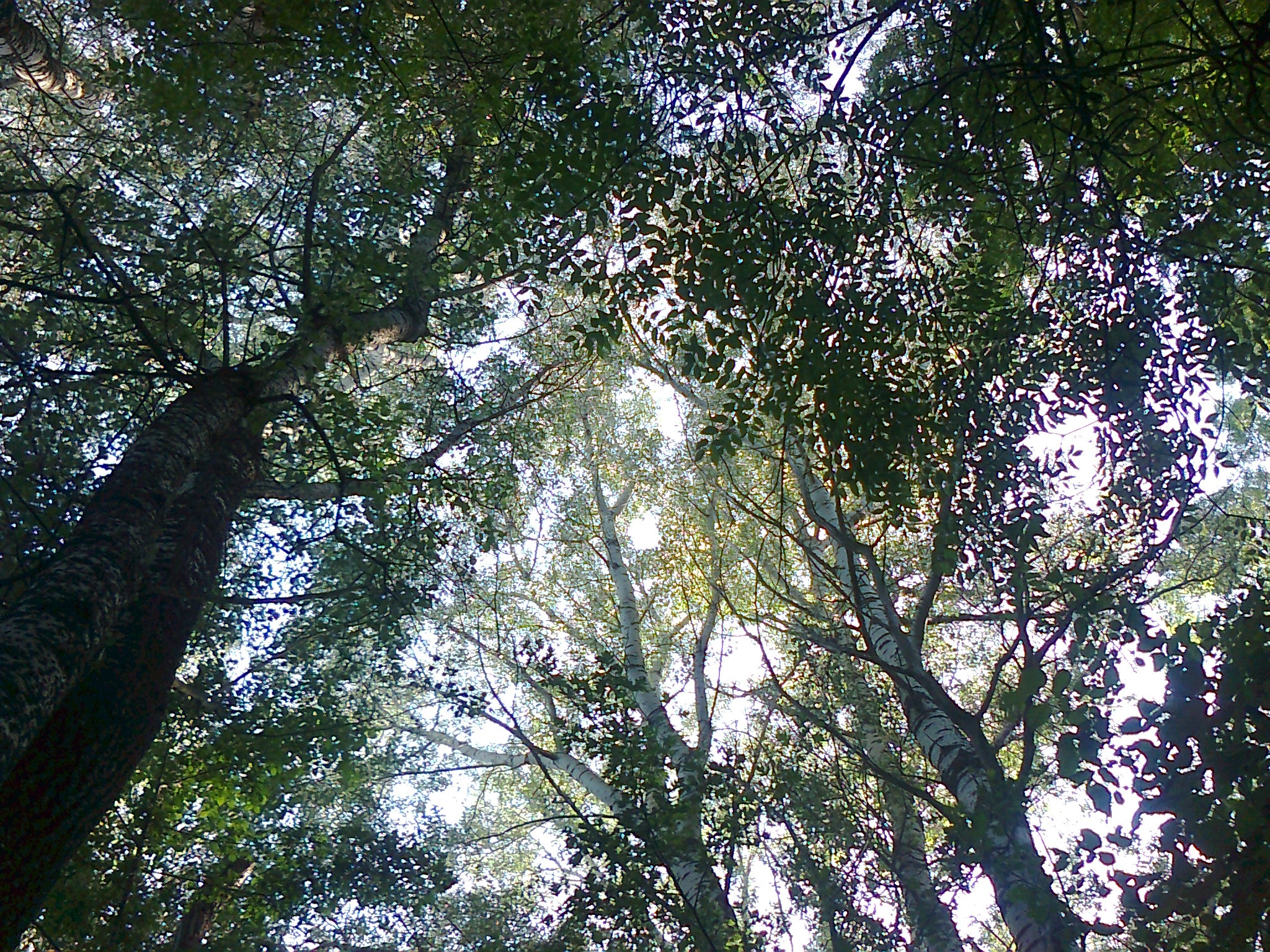 Бели тополи (Populus alba) край резерват "Балабана".